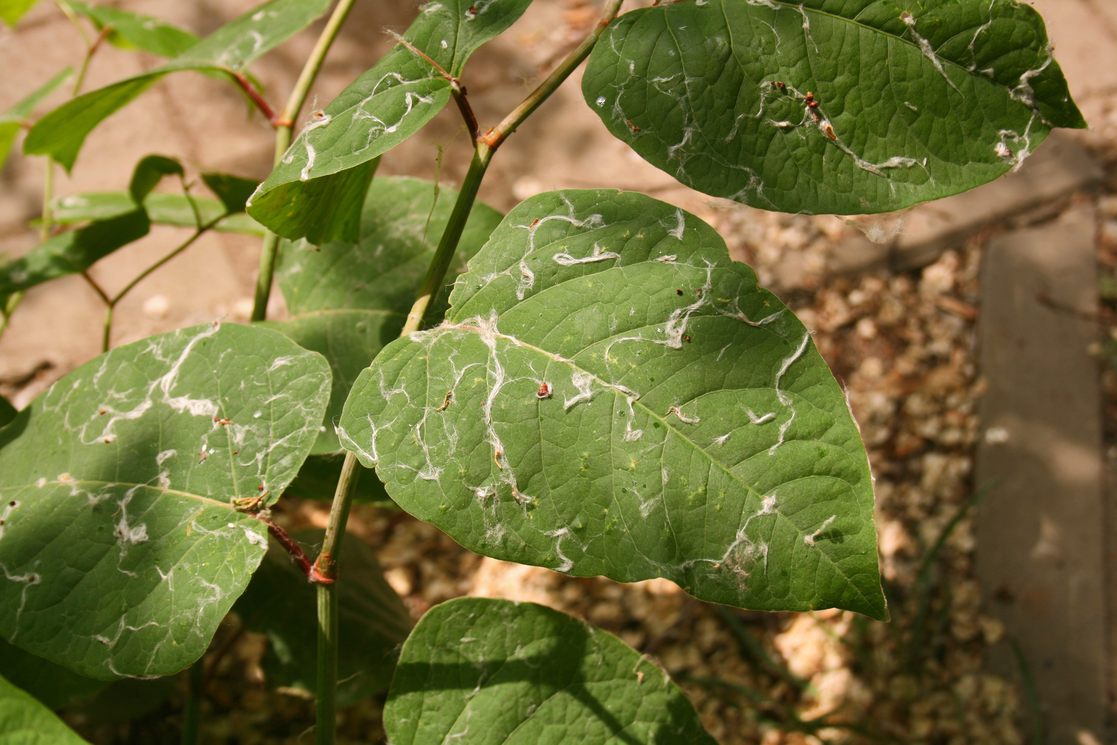 Тополиный пух на растении Горец сахалинский. Белгород